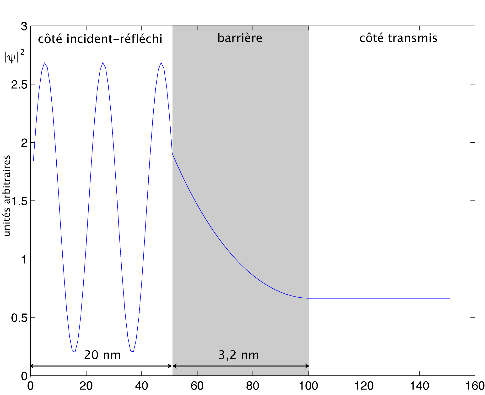 exemple de densité de probabilité de présence, barrière tunnel Description de l'image : schéma montrant la densité de probabilité de présence dans le cas d'une barrière rectangulaire simple, cas du comportement tunnel. Source : créée pour illustation de l'article effet tunnel. Statut : Licence de documentation libre GNU (GFDL : GNU Free Documentation Licence).